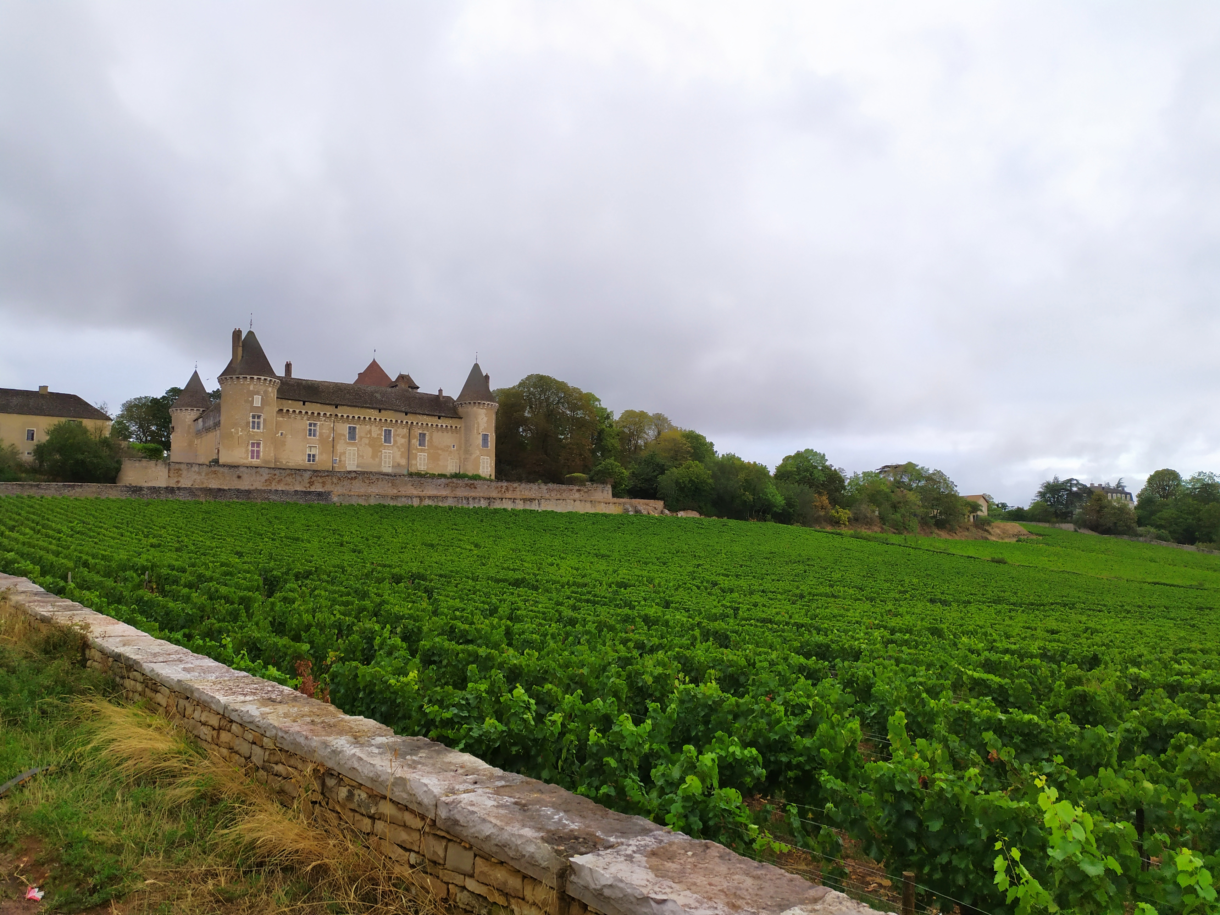 Photographie du Chateau de Rully avec de la vigne en premier plan.